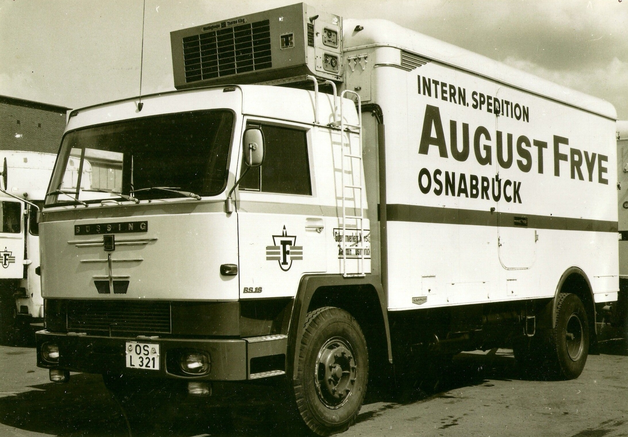 Büssing BS 16 mit 240 PS